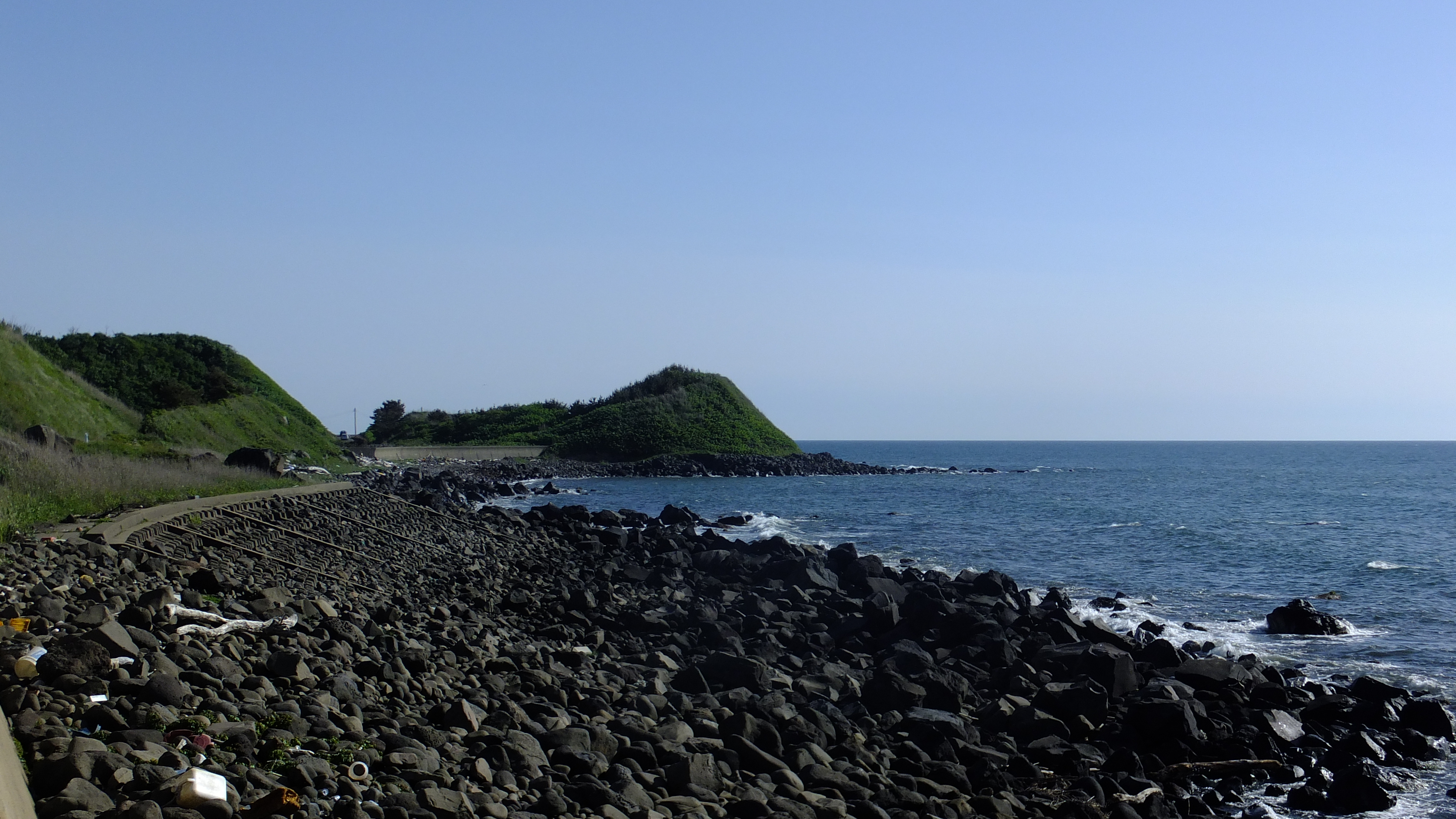 秋田県にかほ市、金浦地区にある由利海岸。江戸時代にこれらの自然石を使って羽州浜街道を守るための石垣が組まれた。